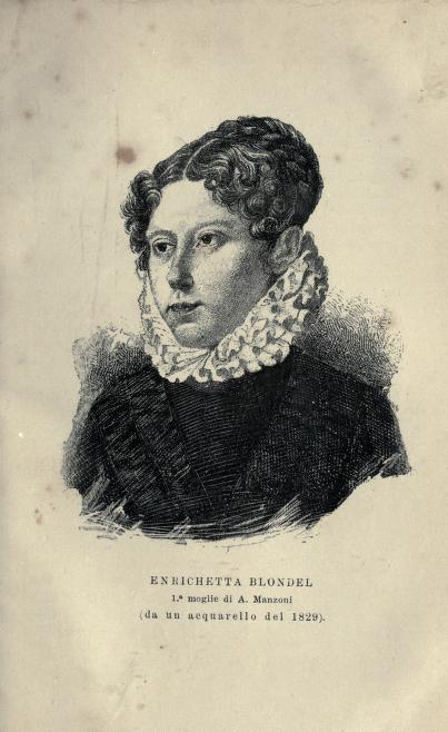 Ritratto di Enrichetta Blondel